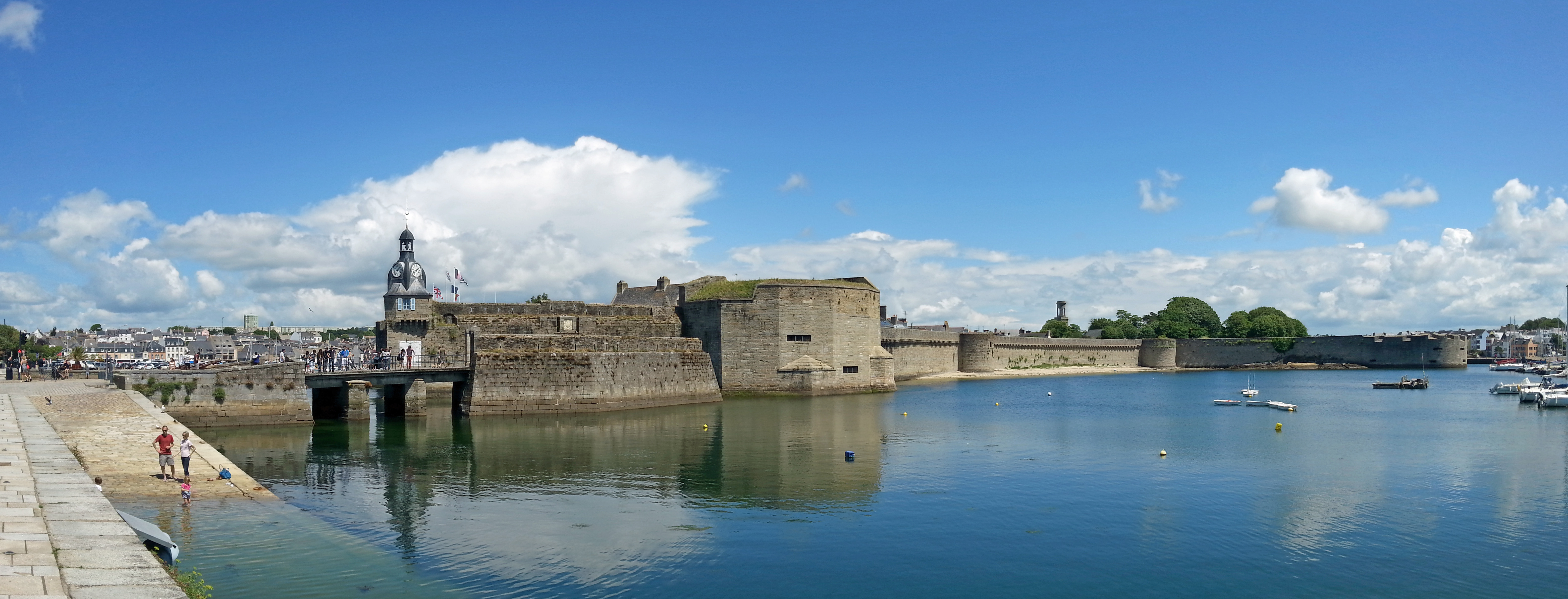 Ville Close de Concarneau